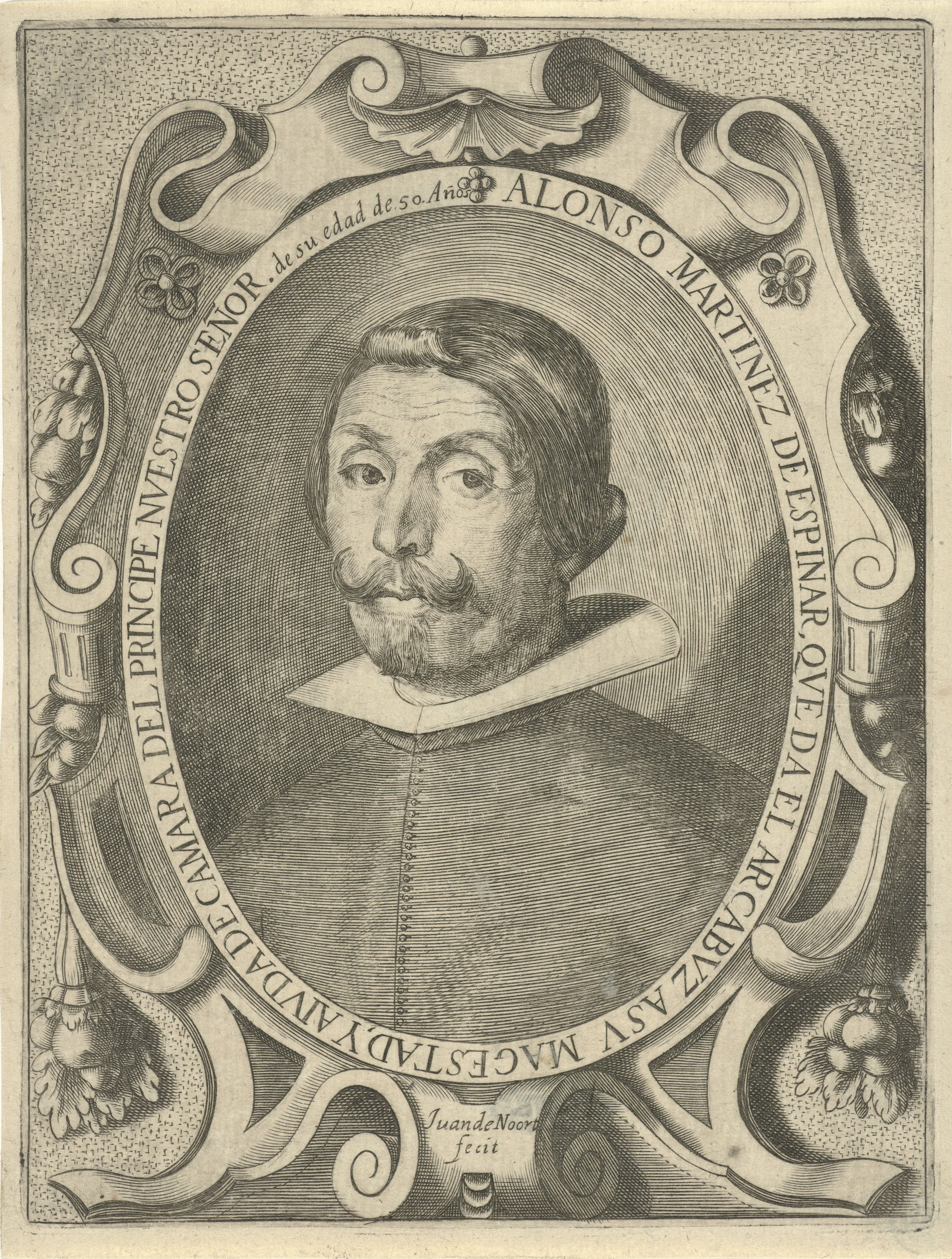 IdentificatieTitel(s): Portret van Alonso Martinez de EspinarObjecttype: prent Objectnummer: RP-P-1938-590Catalogusreferentie: Hollstein Dutch 8Opschriften / Merken: verzamelaarsmerk, verso, gestempeld: Lugt 2228verzamelaarsmerk, verso, gestempeld: Lugt 760Omschrijving: Portret van Alonso Martinez de Espinar op 50-jarige leeftijd in een ornamentele lijst.VervaardigingVervaardiger: prentmaker: Juan van Noort (vermeld op object)Plaats vervaardiging: MadridDatering: 1629 - 1652Fysieke kenmerken: gravureMateriaal: papier Techniek: graveren (drukprocedé)Afmetingen: plaatrand: h 178 mm × b 134 mmOnderwerpWie: Alonso Martinez de EspinarVerwerving en rechtenVerwerving: onbekendCopyright: Publiek domein